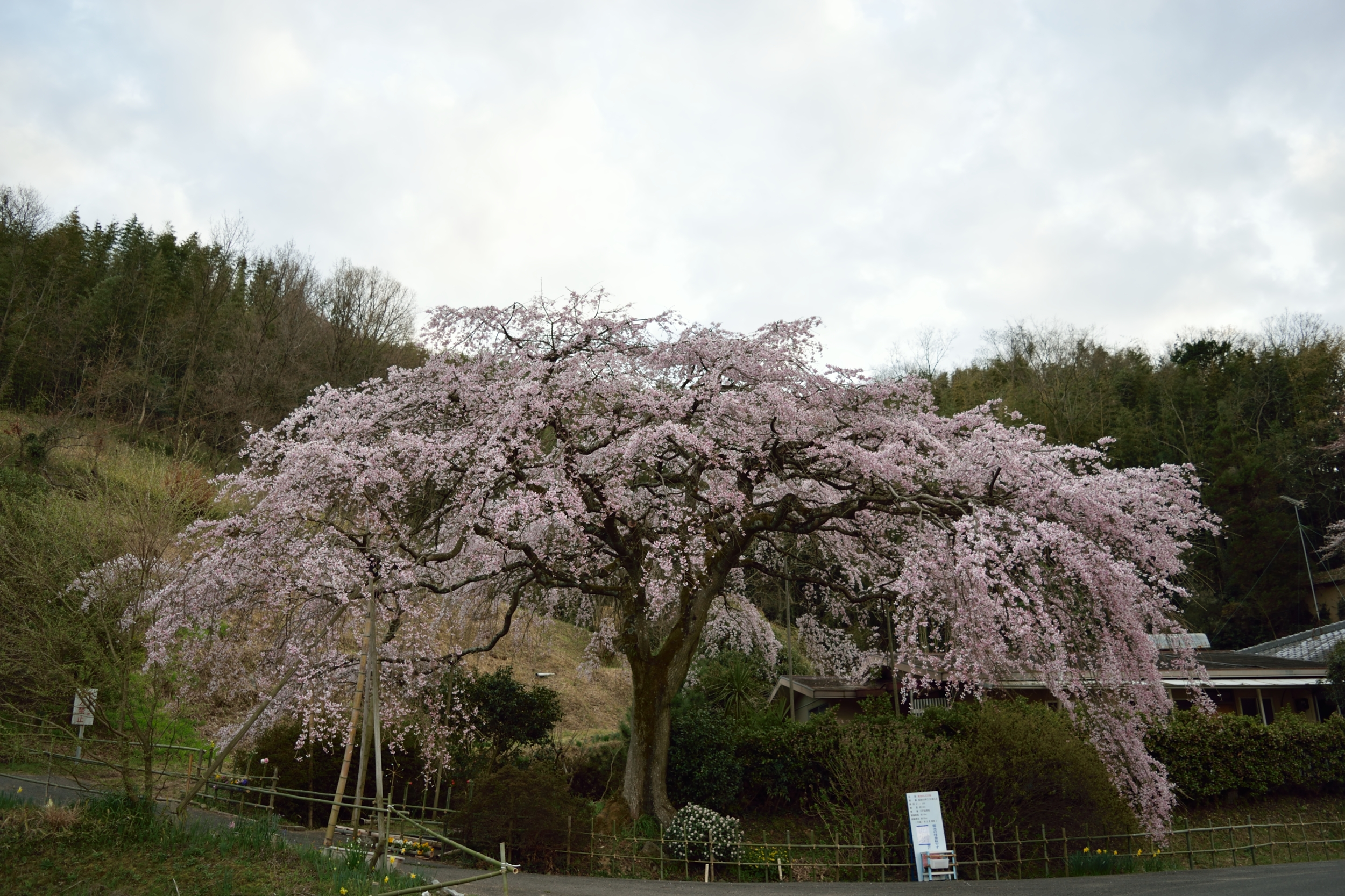 香川県綾川町西分地区にあるしだれ桜